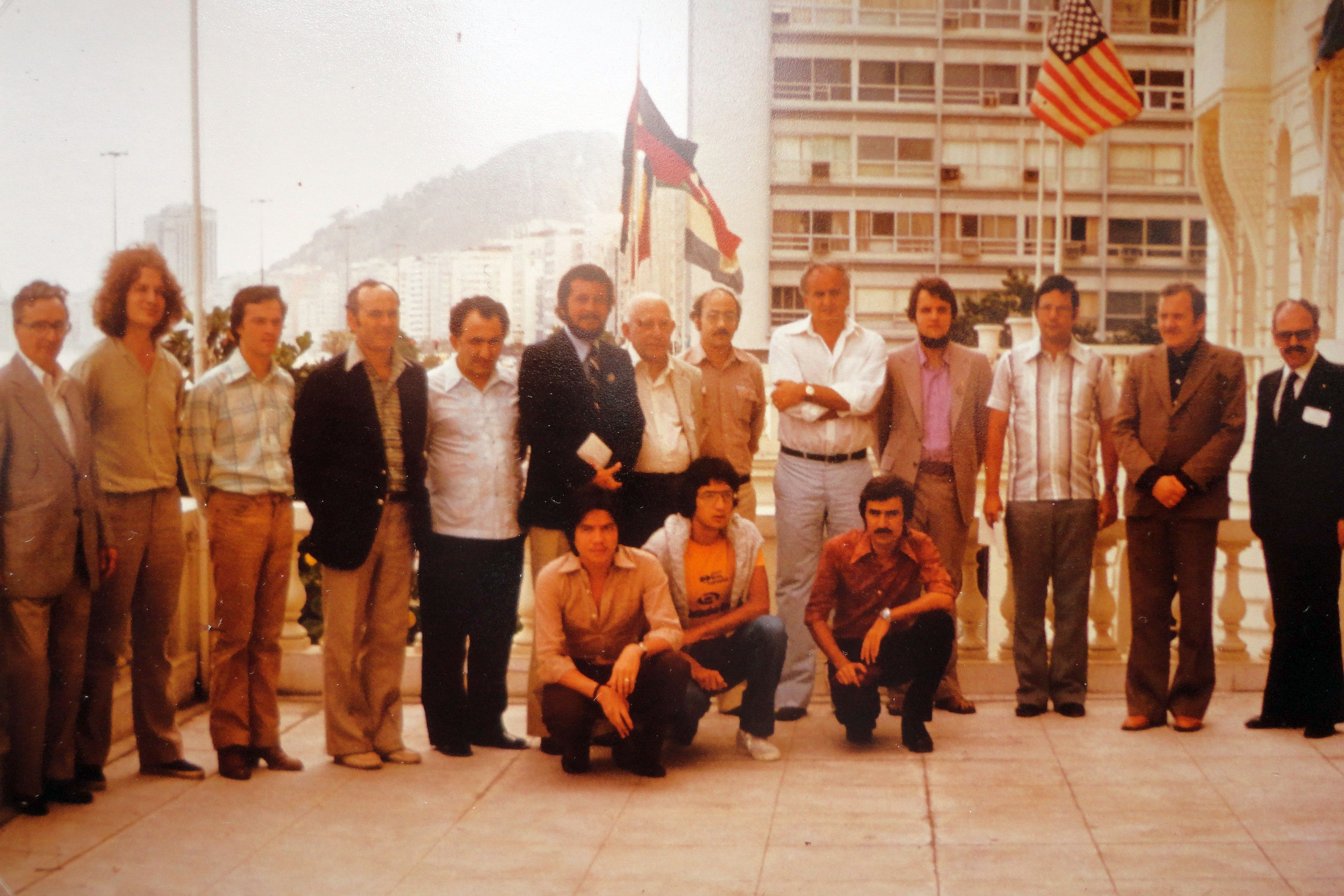 Gruppenbild Interzonenturnier 1979 in Rio de Janeiro, Teilnehmer und Funktionäre.